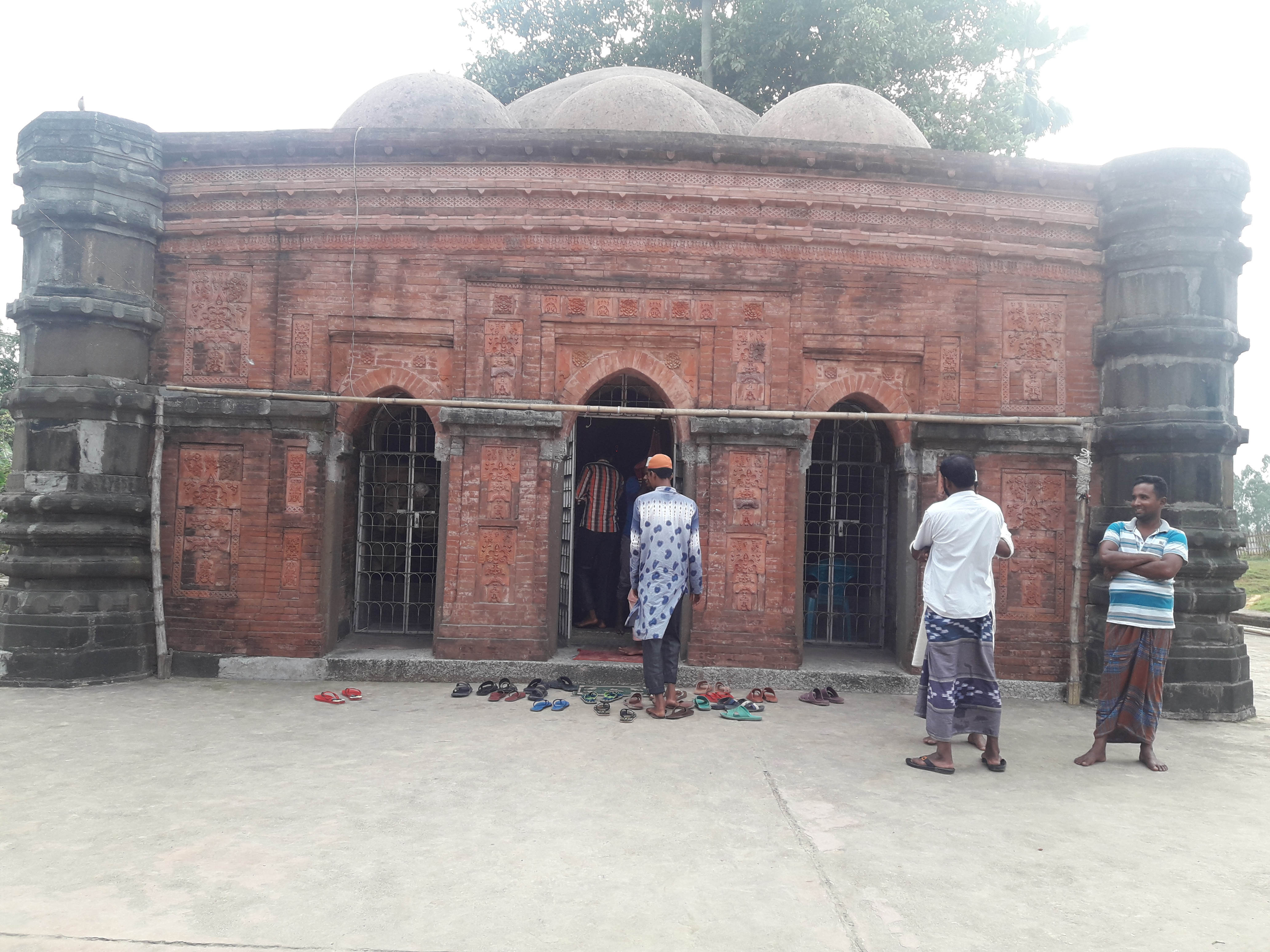 সুরা মসজিদ